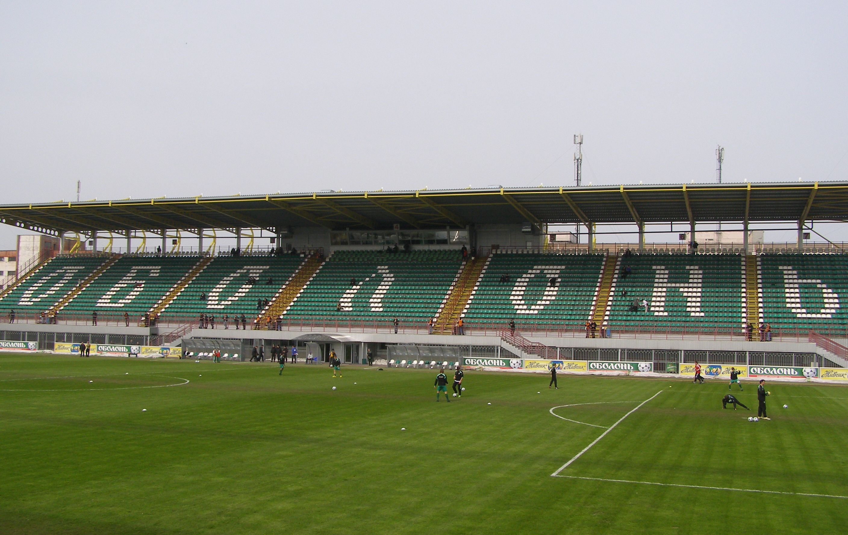 Obolon-Stadion in Kyjiw